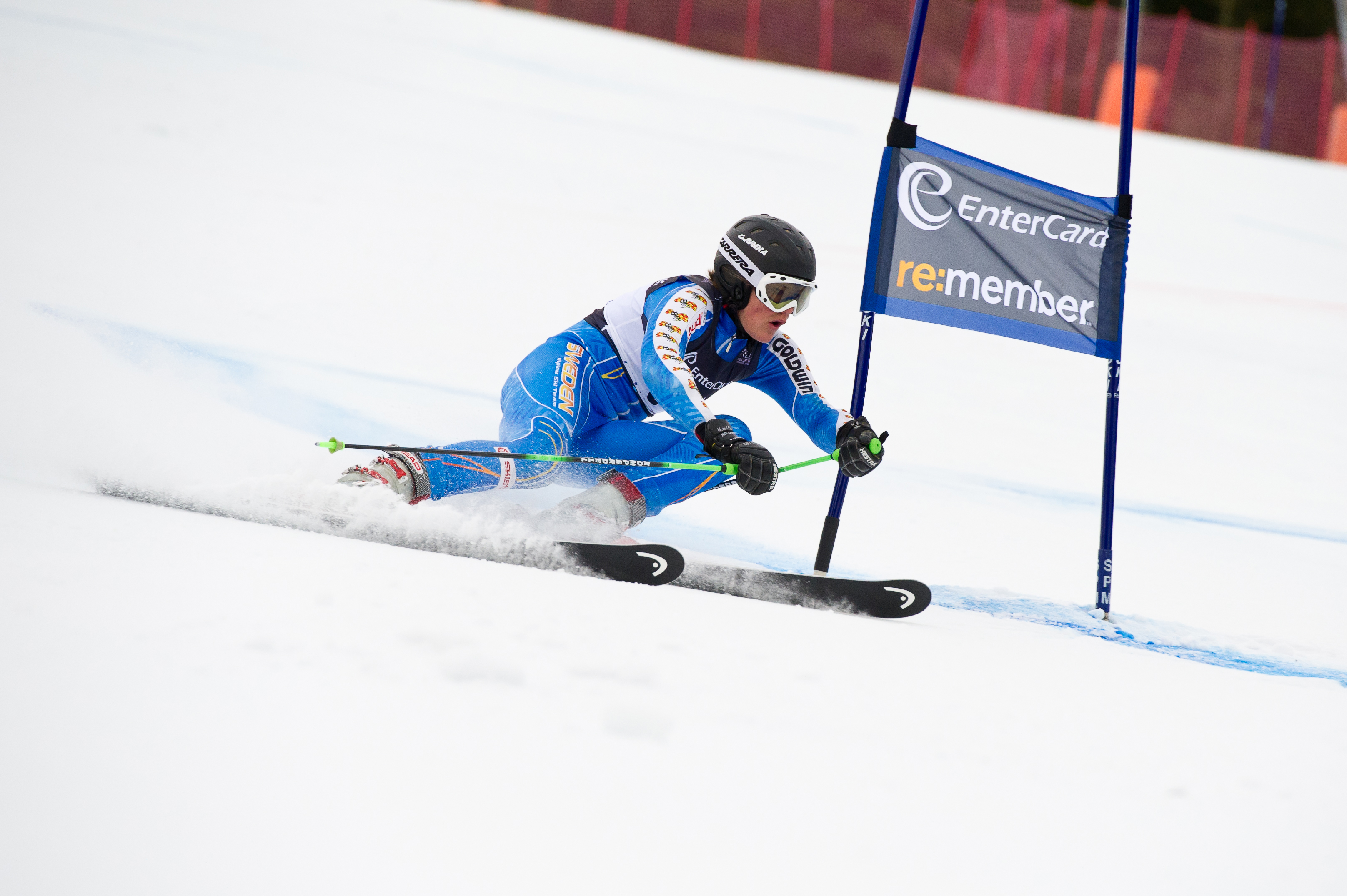 Nr. 8 Anna Swenn-Larsson (Swe) i NM i storslalåm for damer i Trysil 26. mars 2011. Foto: Ola Matsson